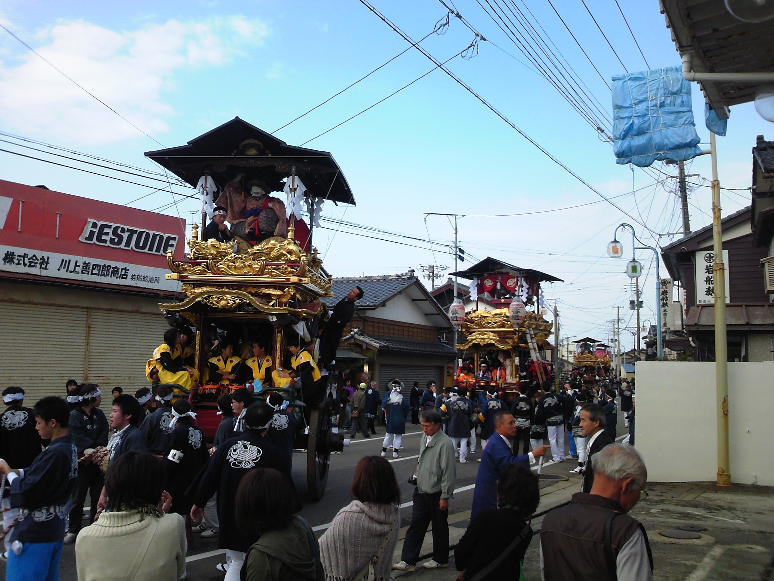 岩船大祭 おしゃぎり